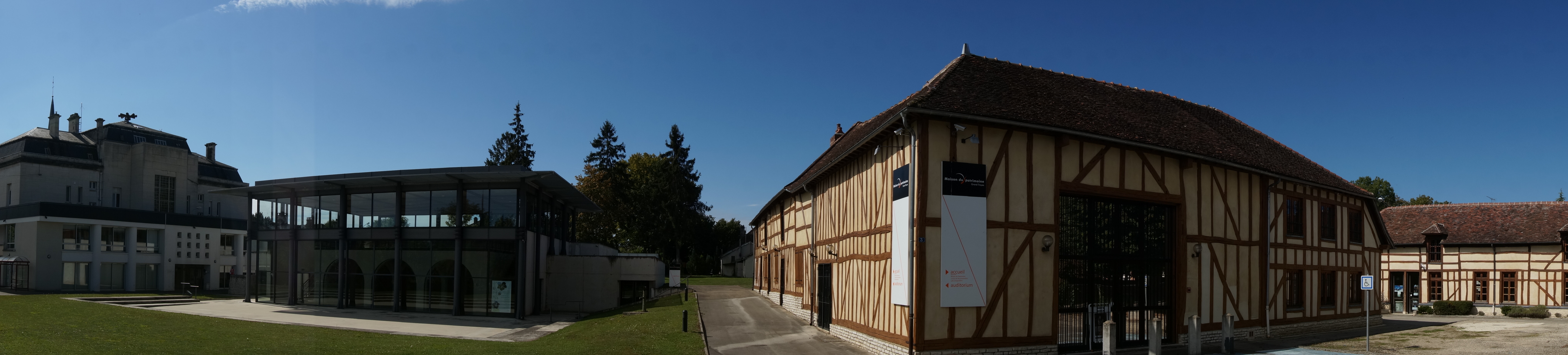 vue de Saint-Julien-les-Villas.